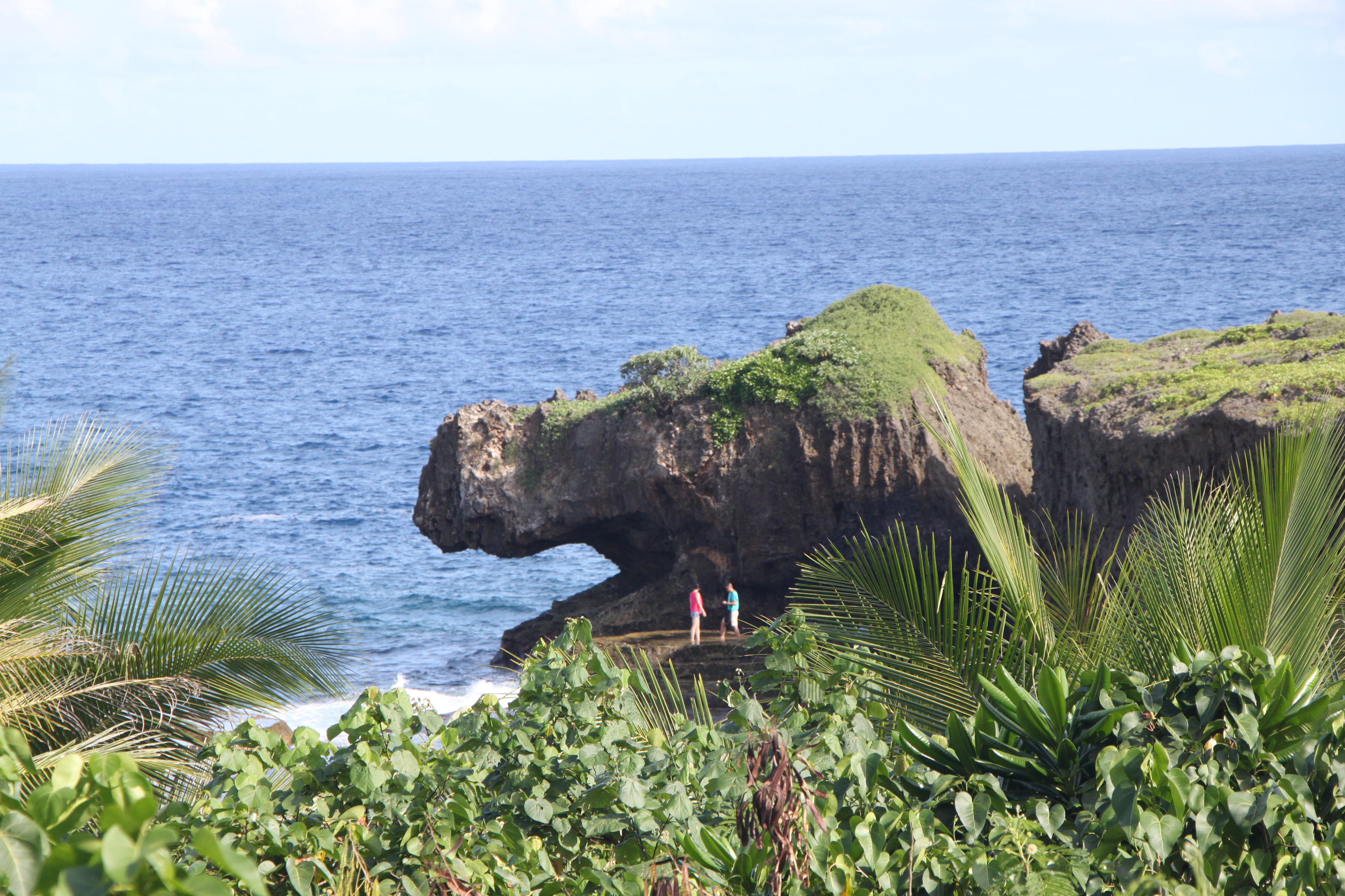 中文（中国大陆）: 鳄鱼头海滩